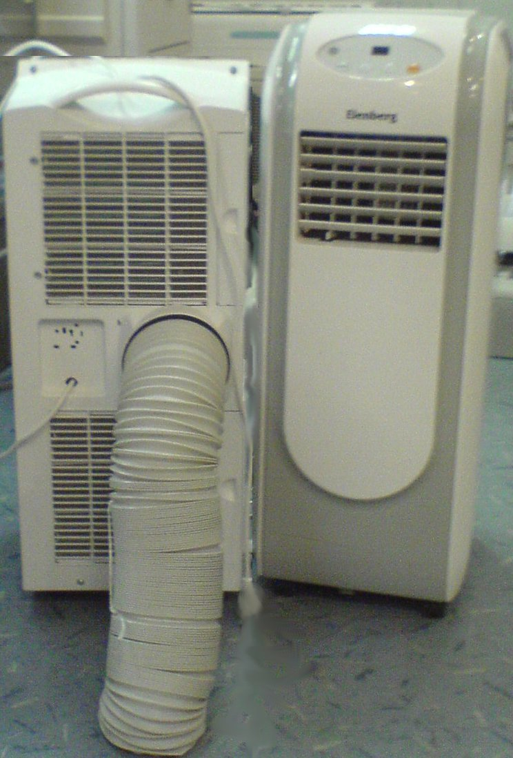 Мобильный моноблочный кондиционер. Вид спереди и сзади